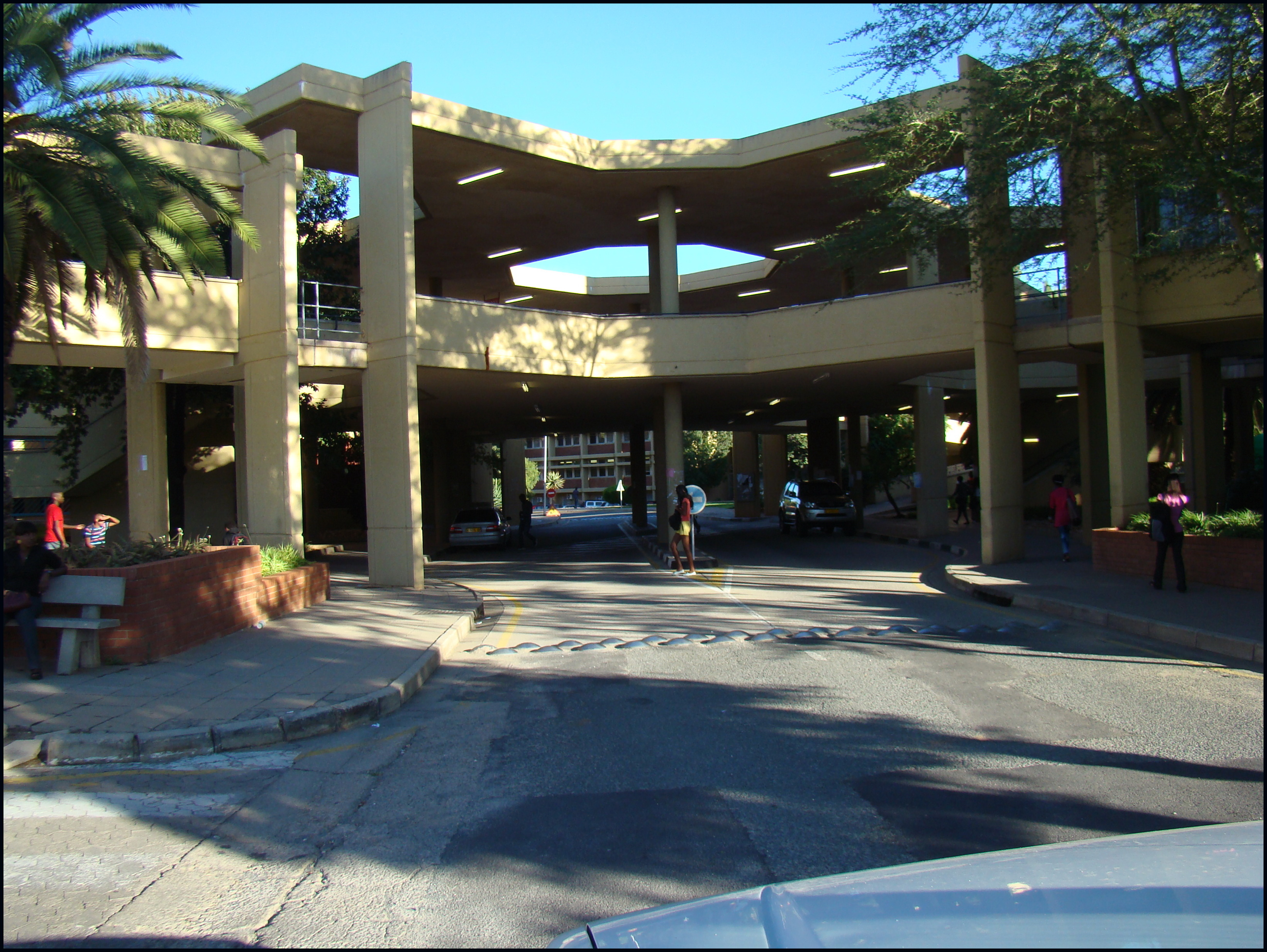 Вход в кампус Национального университета Намибии, март, 2012.